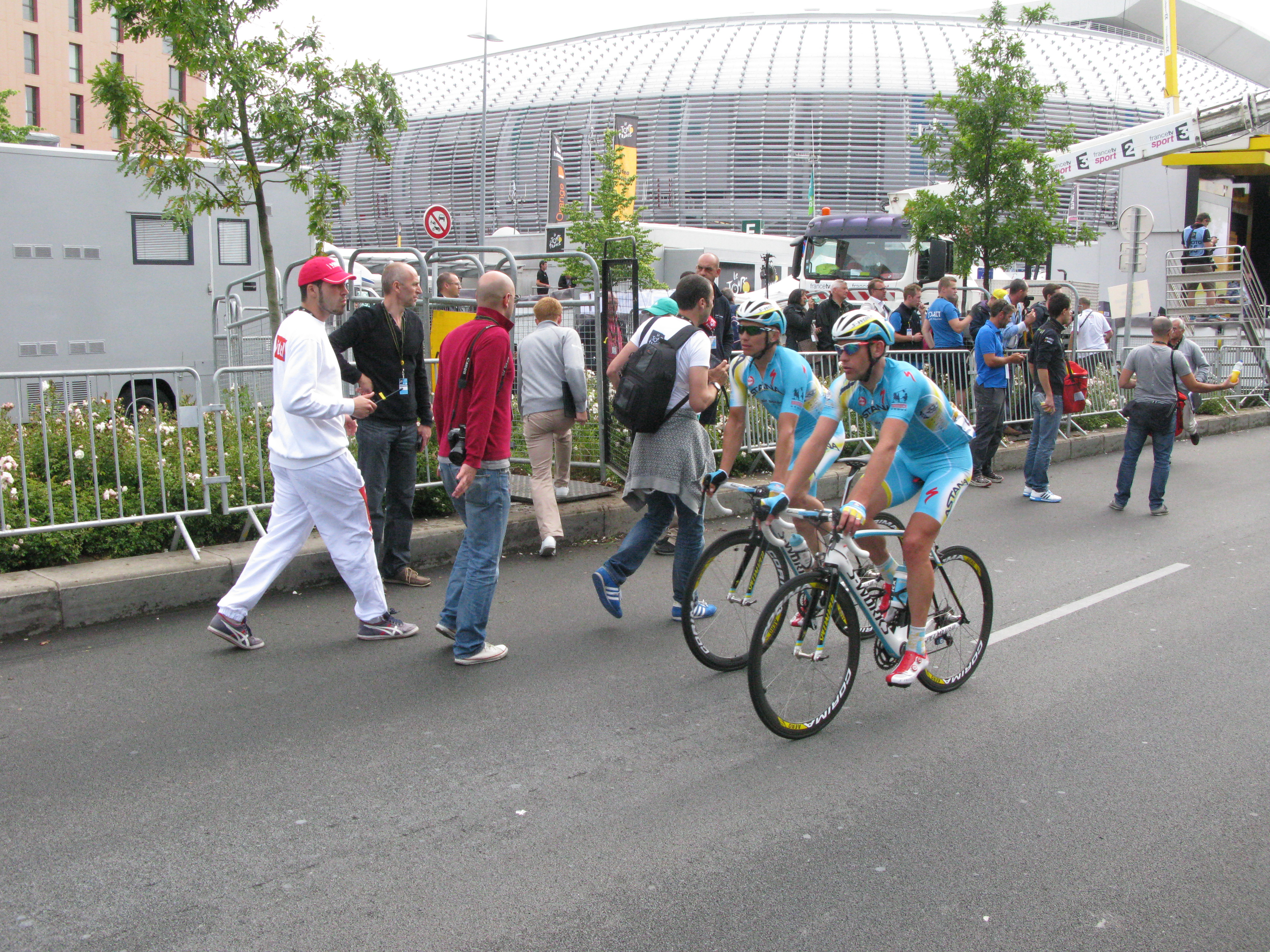 Maxim Iglinskiy et Dmitriy Gruzdev. Arrivée de la 4e étape du Tour de France 2014 à Villeneuve-d'Ascq.